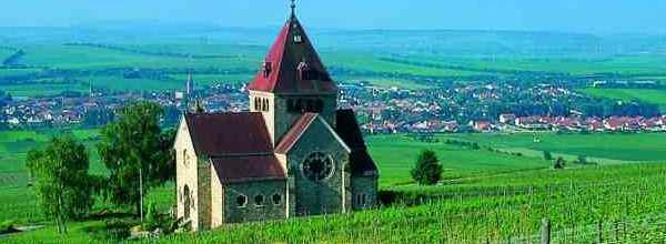 Gau-Bickelheim mit Kapelle Blick hin bis zum Donnersberg eigenes bild darf frei verwendet werden